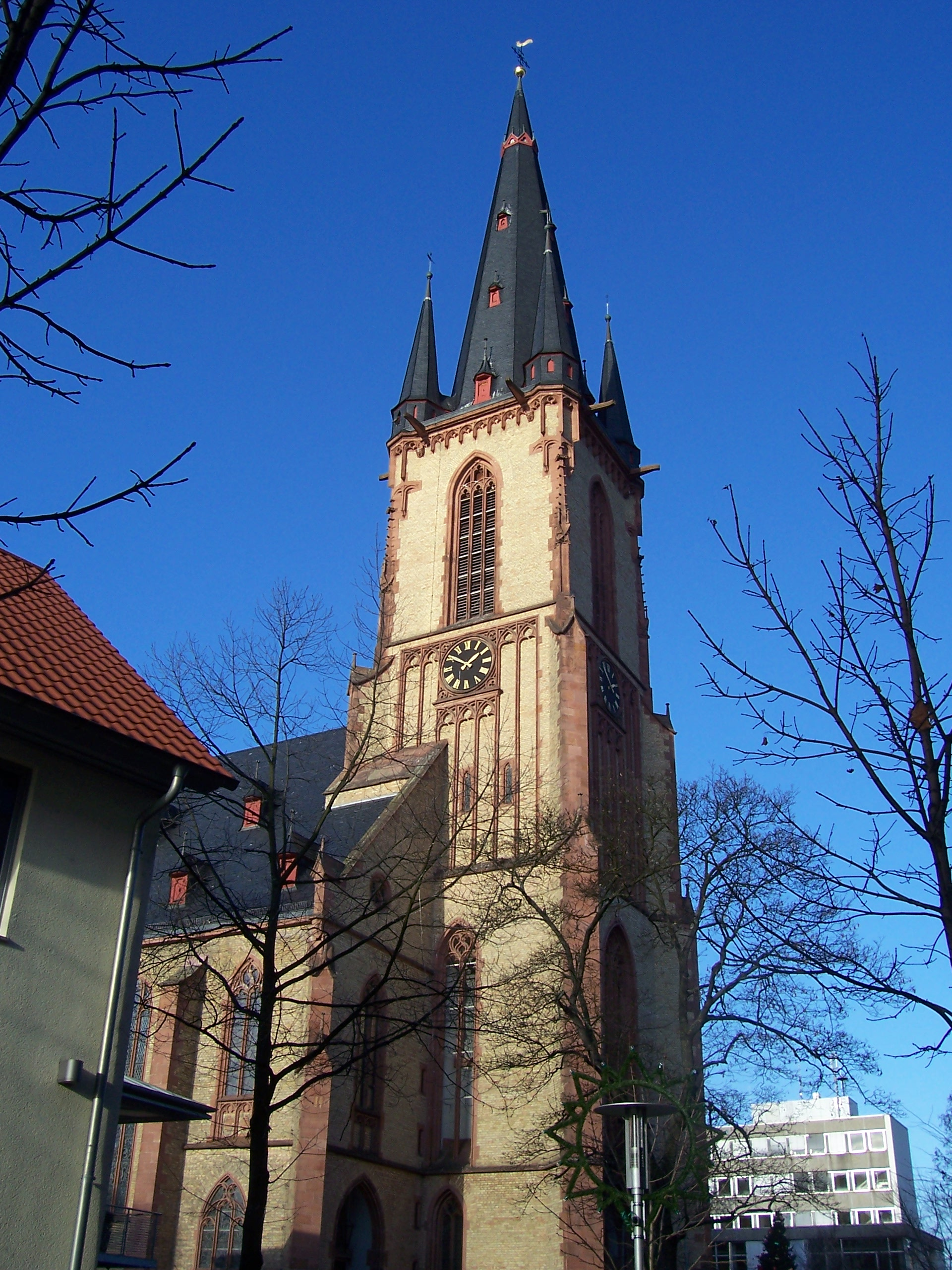 Die katholische Kirche Sankt Aposteln in Viernheim am 13. Dezember 2005 My own photo